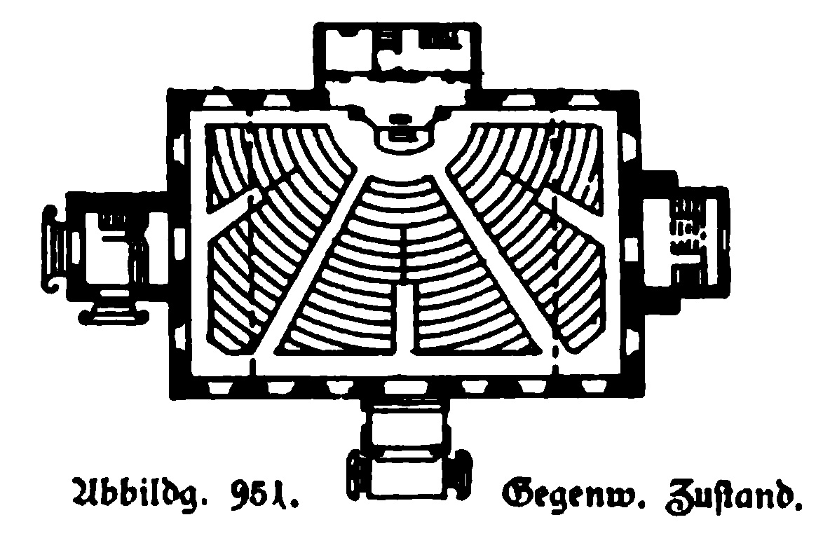 erbaut 1761, Zustand 1895